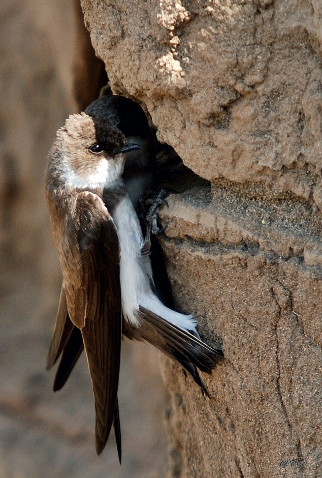 Kurdî: Li Tepêya Baravan hatiye kişandin. Navê Latînkî:Riparia riparia Navê îngilizkî:Sand martin Navê Tirkî:Kum kırlangıcı Nîkon D80/Sîgma 50-500mm